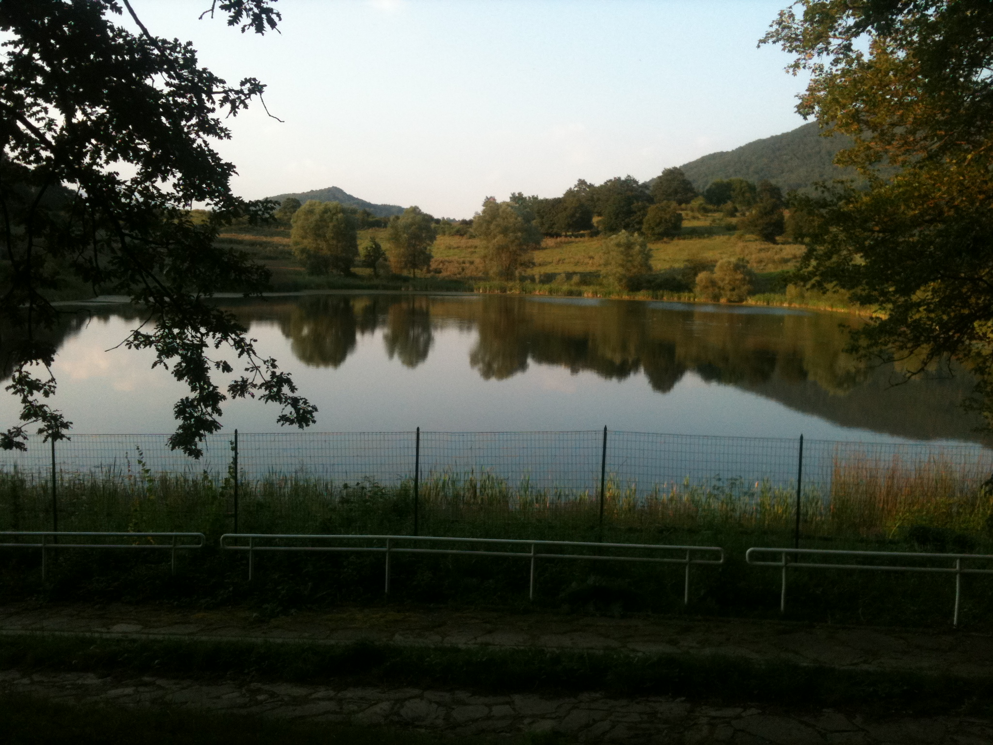 Panorama giornata estiva in località Feudozzo